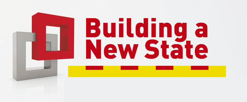 Logo de la Conferència internacional Building a New State (Barcelona, 2011-2014)